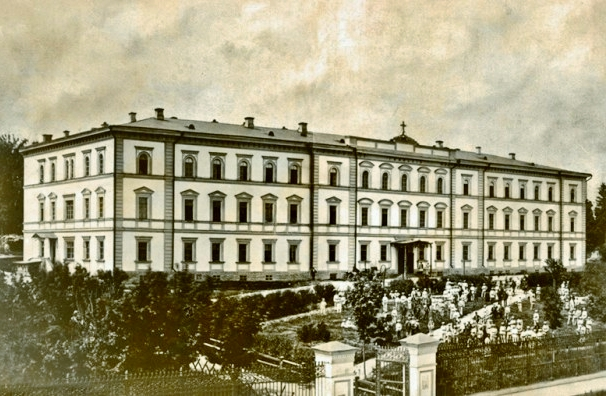 Il liceo maschile di Penza (1804-1918) intitolato a Vissarion Belinskij in un'immagine d'epoca